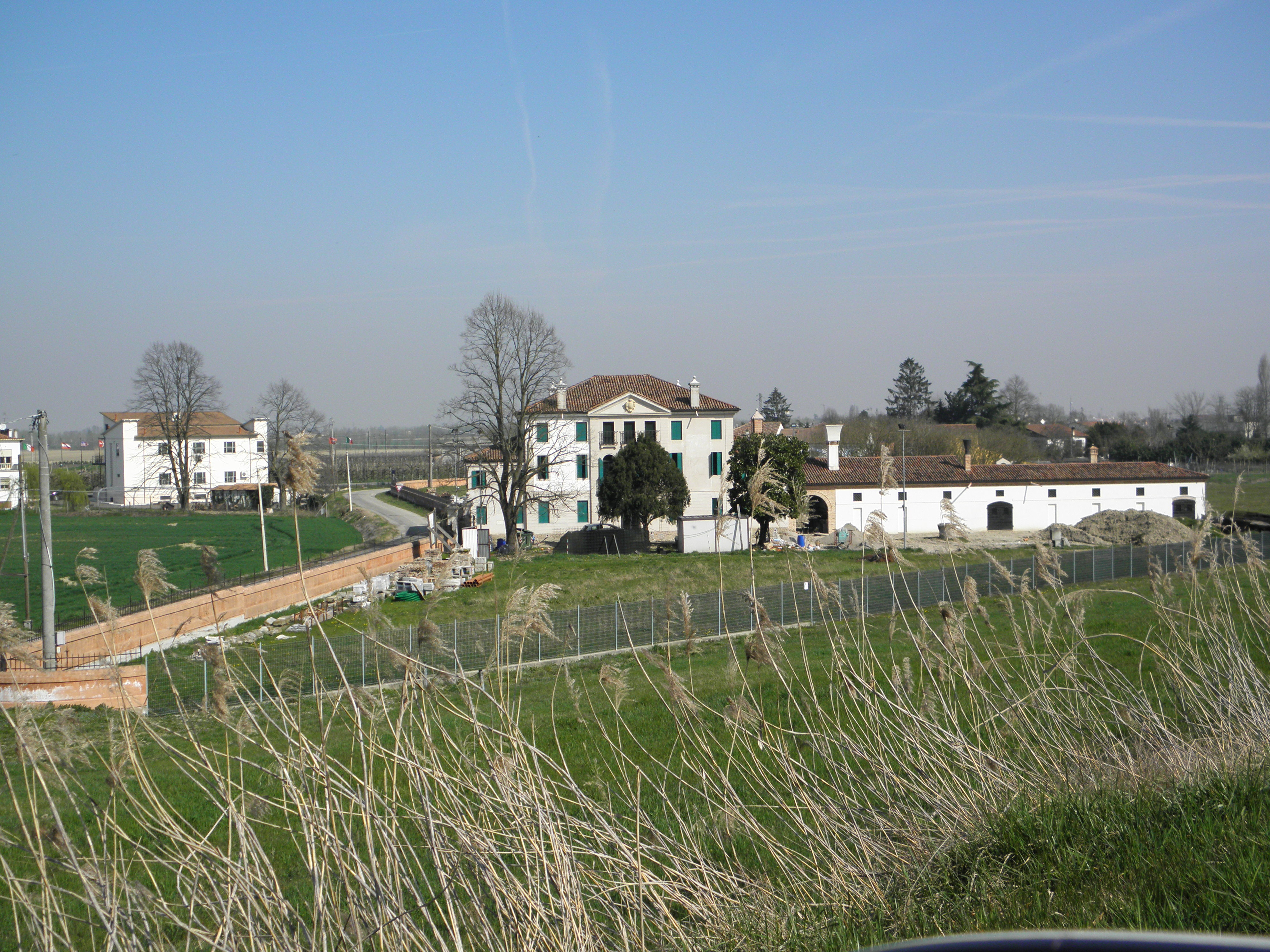 Paviole, località nel comune di Canaro, provincia di Rovigo: la Villa Martelli-Piccioli (XIX secolo).